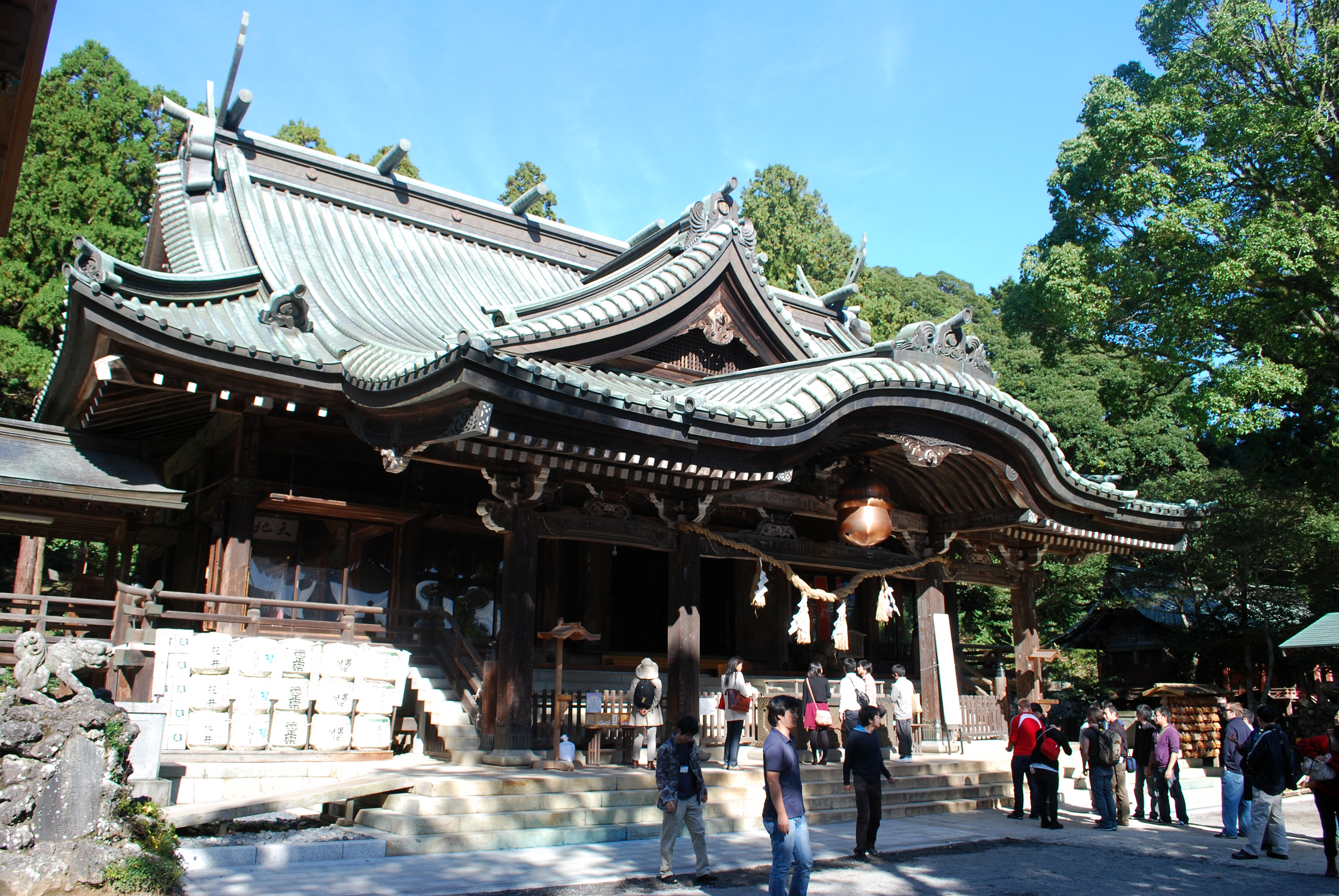 Mount Tsukuba - Jinja shine